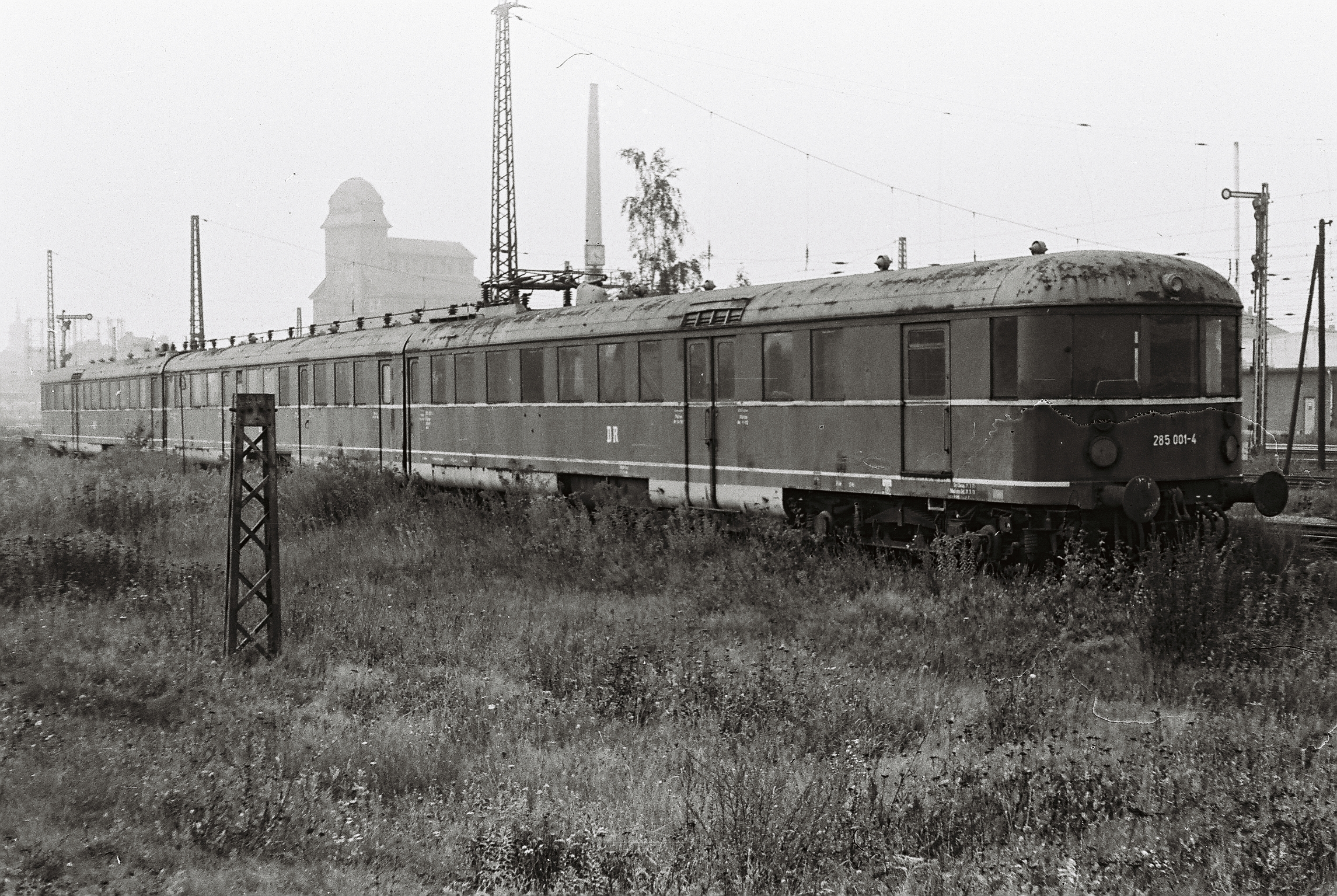 ET 25 012 nach seiner Ausmusterung im Bahnhof Wurzen